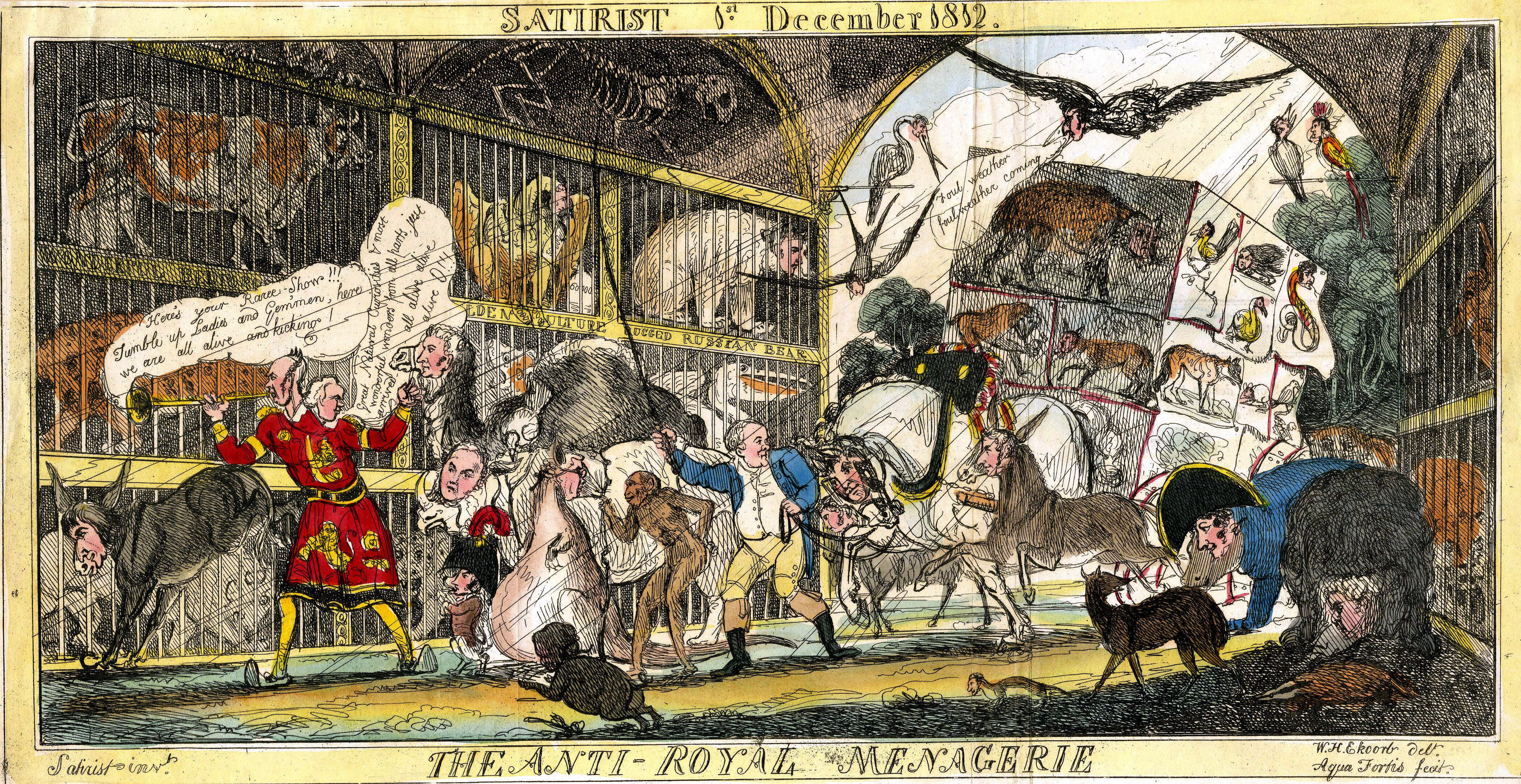 The anti-royal menagerie Handkolorierte Radierung 1812